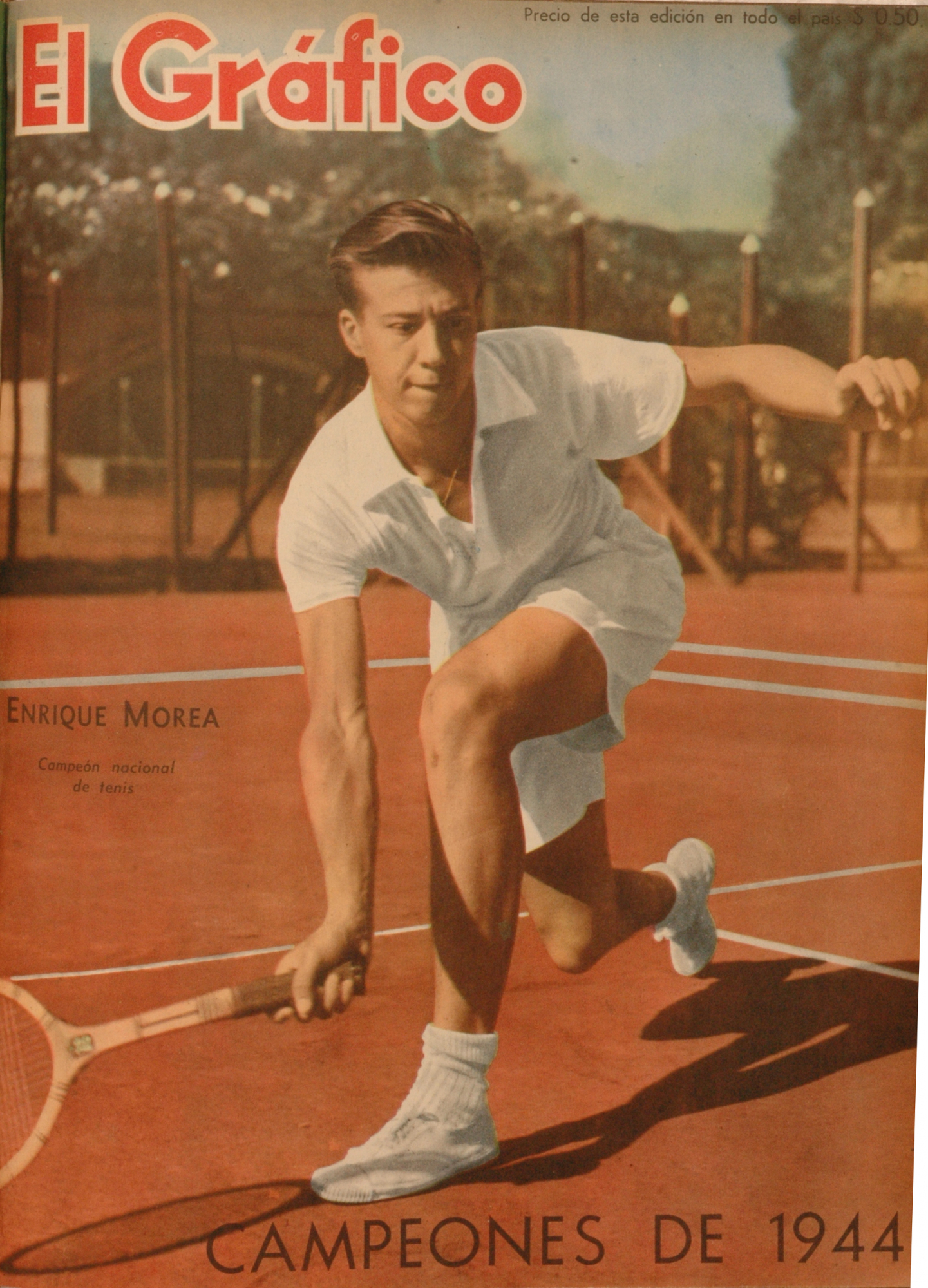 El Grafico del 29 de Diciembre de 1944. Edicion 1329